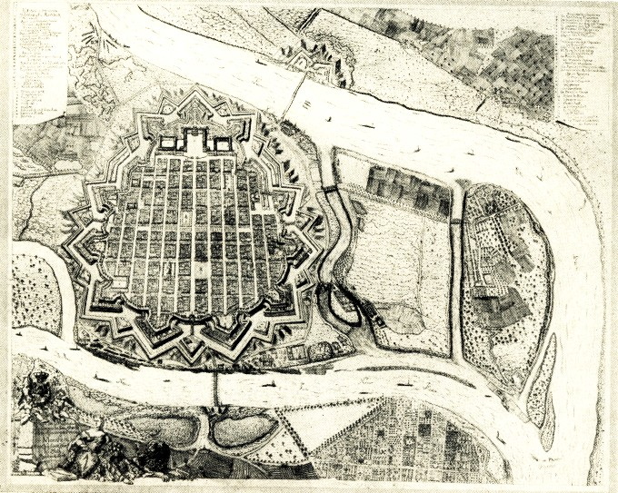 Plan der Residenzstadt Mannheim (Kupferstich von Josef Anton Baertels 1758)